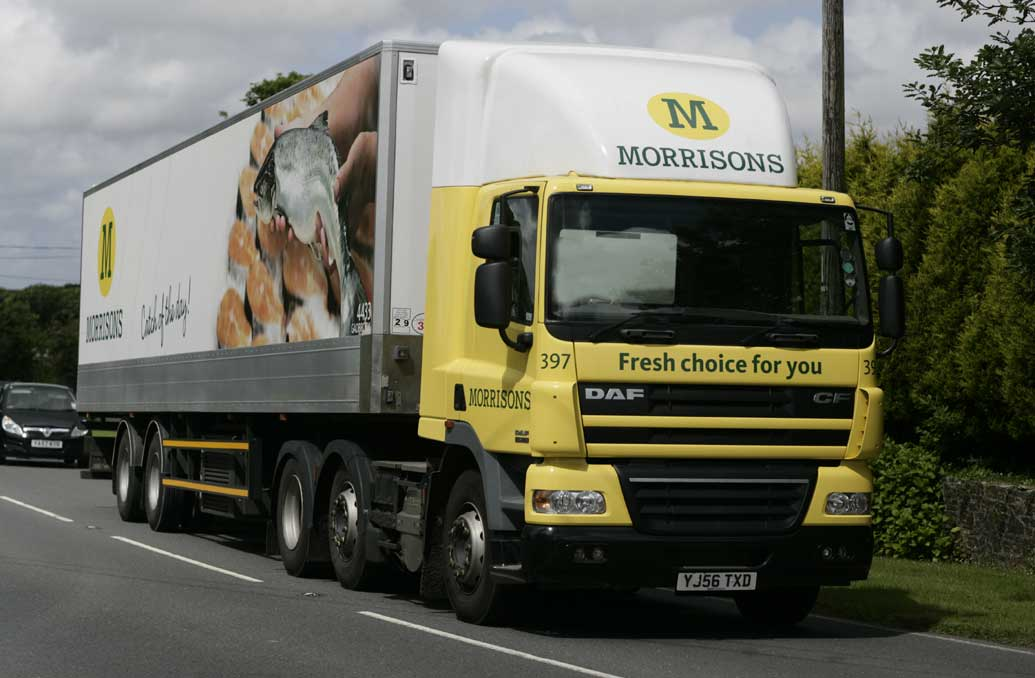 morrison